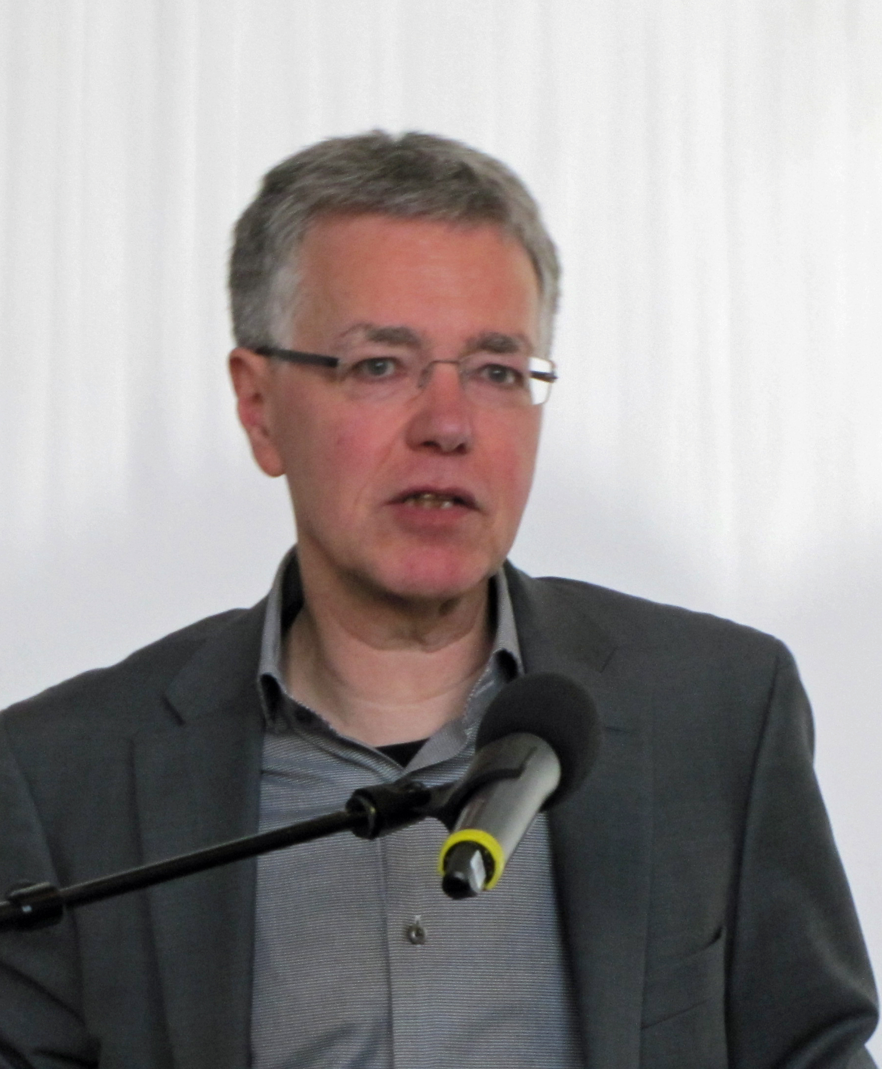 Martin Seel, bei den 44. Römerberggesprächen, Thema:Sehnsucht nach Grenzen, im Dezember 2016 im Chagall-Saal der Städtischen Bühnen in Frankfurt am Main.